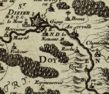 Catalauni. Evesché de Chaalons sur Marne, et en Champagne ou sont les Comté et Pairie ; Balliage, et Eslection de Chaalons : Balliage et Eslection de Vitry ; Comtés, et Balliages de Sainte Menehoud, de Vertus etc / par N. Sanson d'Abbev.